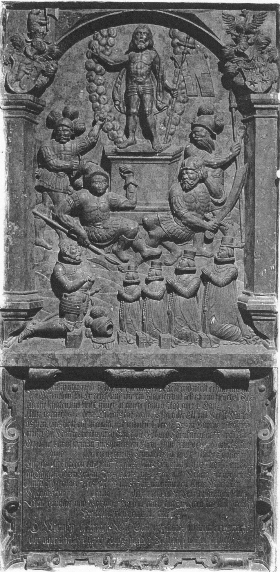 Mattighofen, Propstei- und Pfarrkirche Mariä Himmelfahrt, Grabdenkmal des Matthias II. von Hackledt (+ 1616) und seiner Familie. Eine wissenschaftliche Bearbeitung des Denkmals liegt vor in SEDDON Christopher R., Die inschriftlichen Denkmäler der Herren und Freiherren von Hackledt. Grablegen, Memoria und Repräsentation eines Innviertler Landadelsgeschlechtes, Wien (Dipl. Arb.) 2002, S. 125-128.